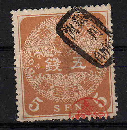 日本が1888年に発行した登記印紙5銭